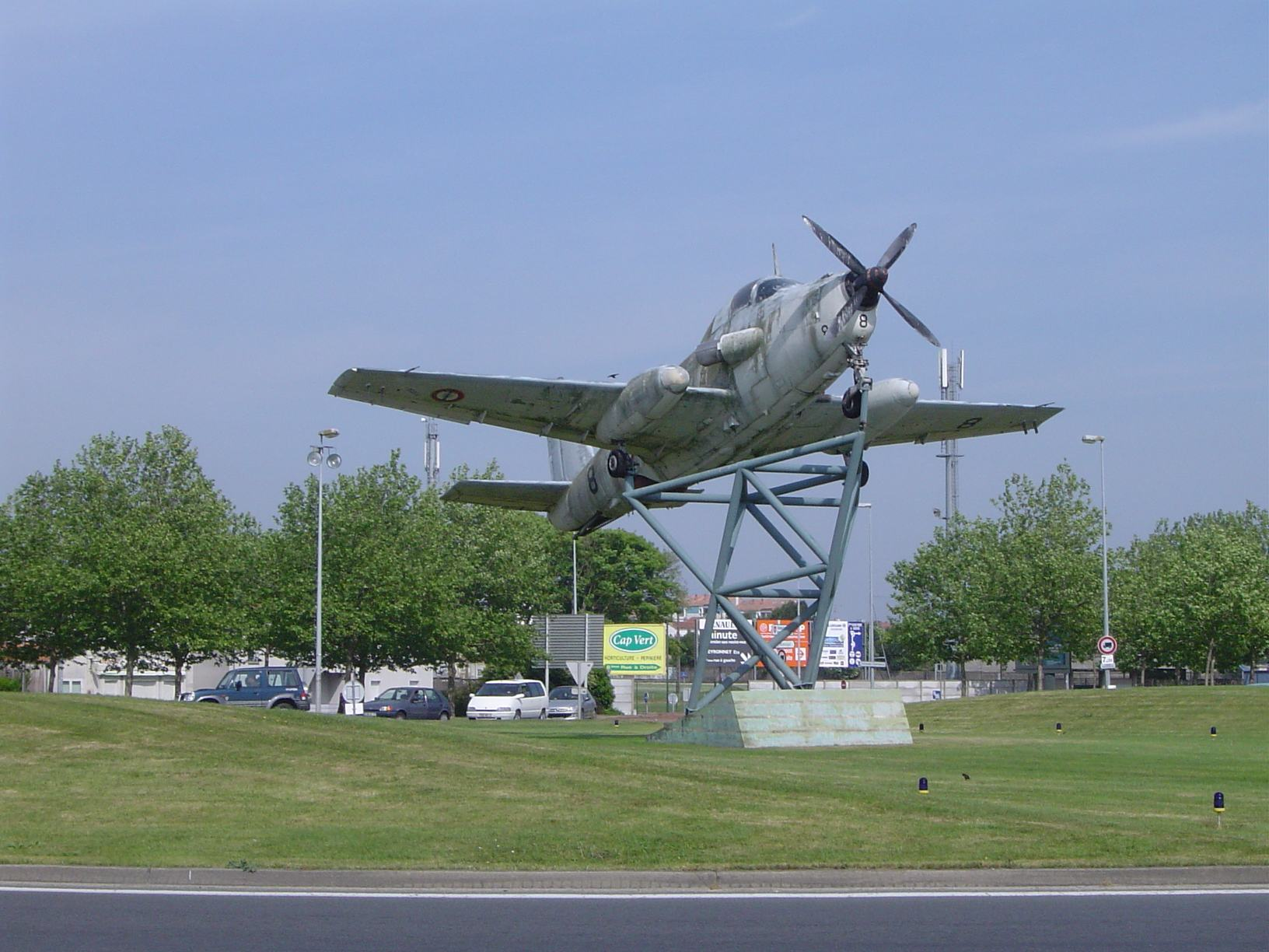 Rond-point à Rochefort avec un avion comme sur une piste d'atterissage avec les lumières bleues